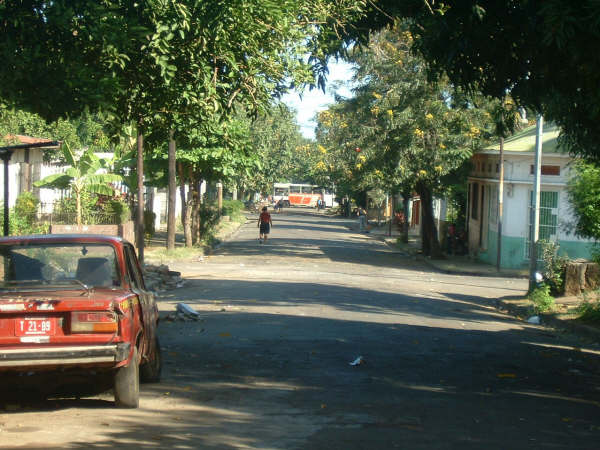 Rue du quartier Marta Quezada, Managua, Nicaragua Auteur: Michel Gagnon, photo prise en décembre 2005, avec un appareil Fuji Finepix A203.